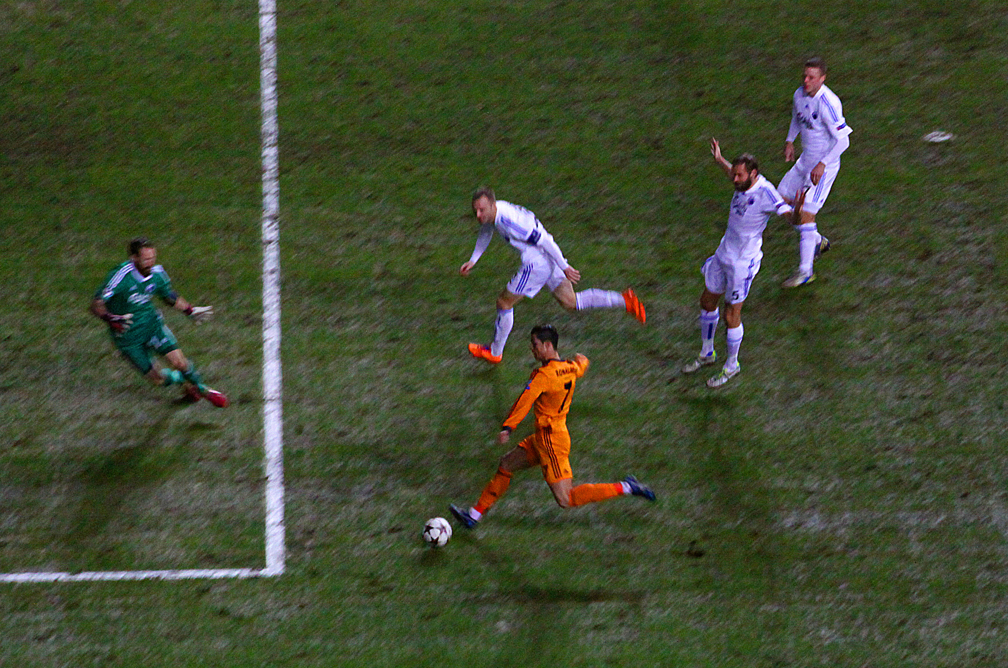 København / Copenhagen. FC København - Real Madrid i Champions League.